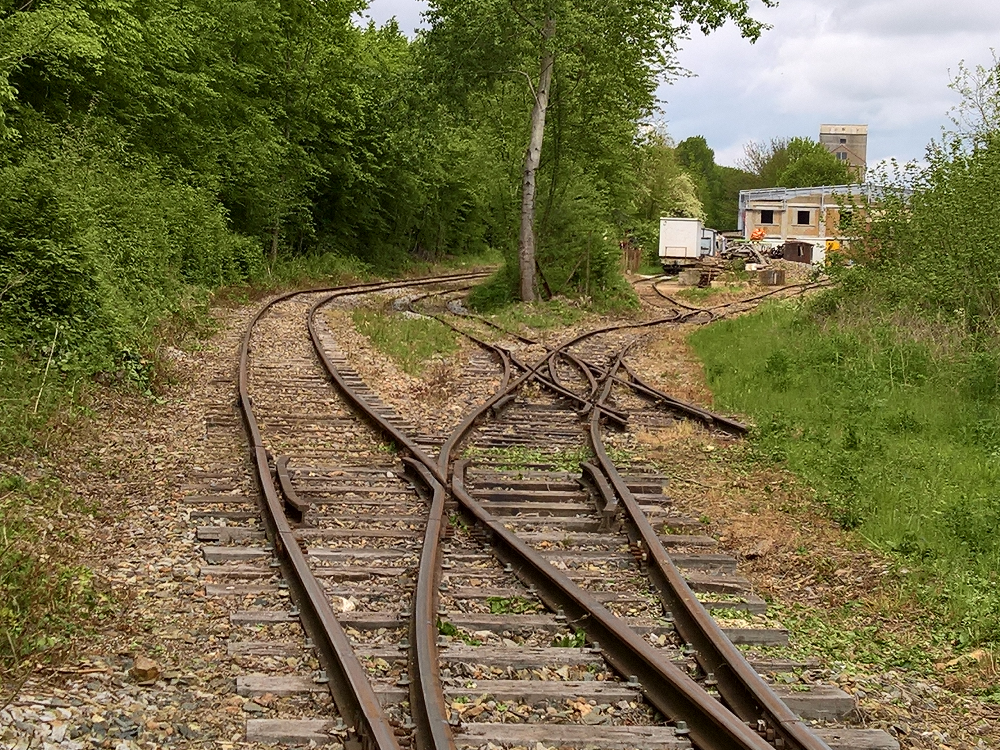 Situation en mai 2017 : à gauche, la voie principale vers le quai de la gare de Crèvecoeur, au centre la voie d'évitement, à droite l'accès au dépôt.